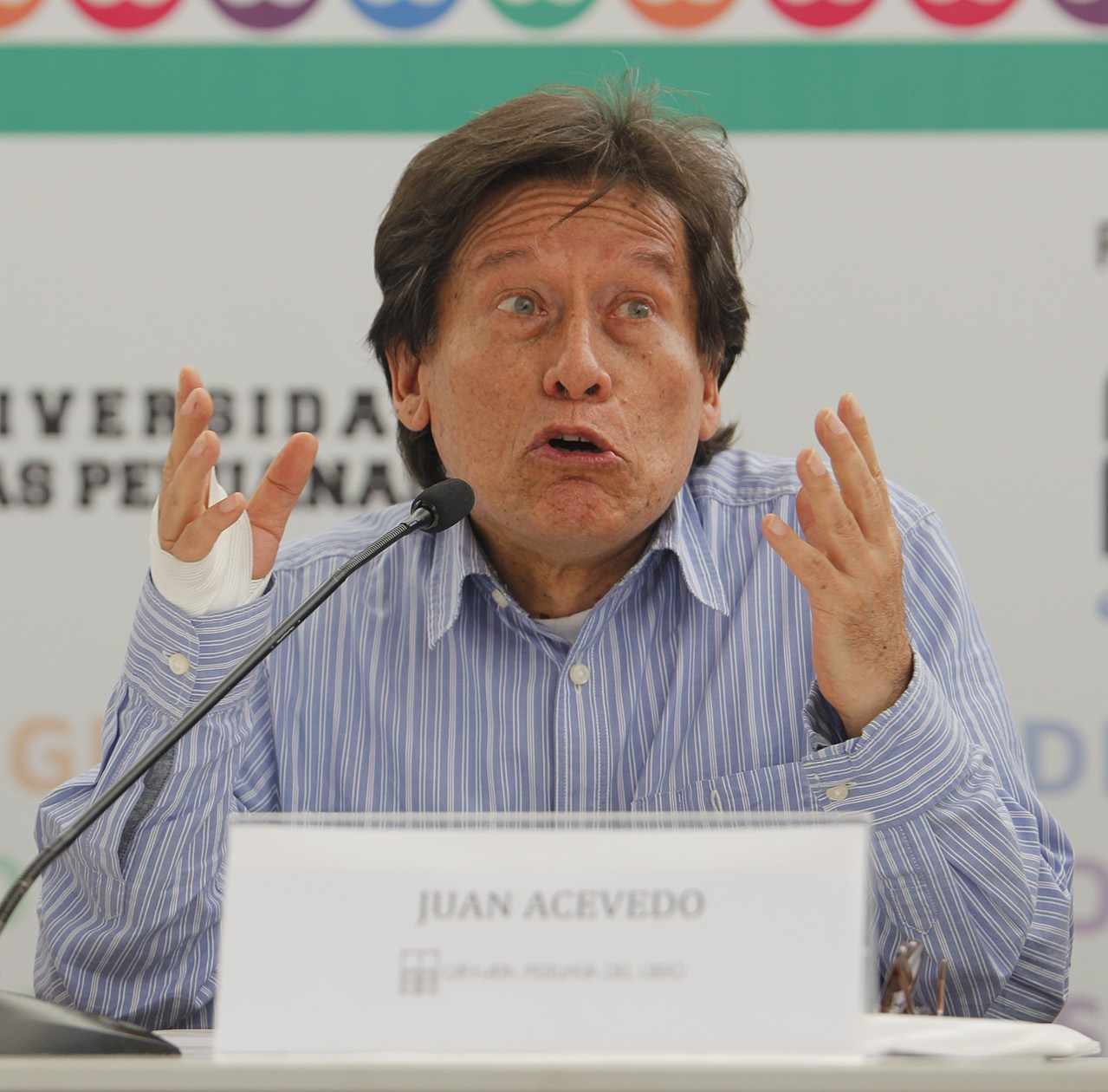 Juan Acevedo Fernández de Paredes en la Feria del Libro Ricardo Palma, 2015.